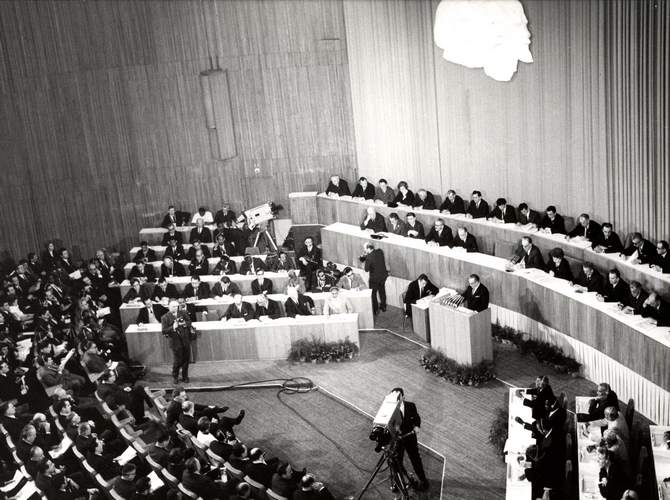 Srpski (latinica): Deveti kongres SKJ u Beogradu 1969. godine